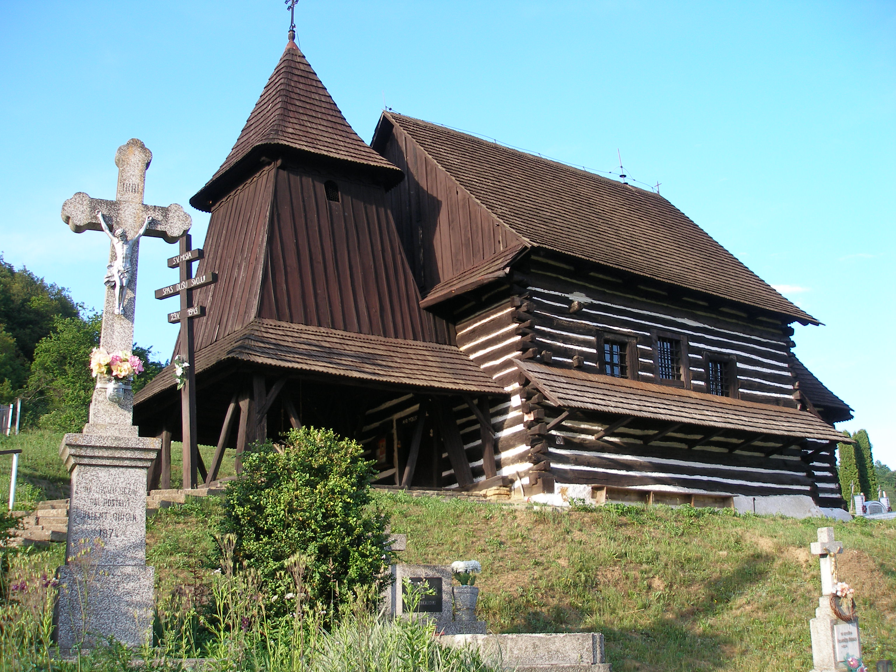 Národná kultúrna pamiatka,drevený kostolík v obci Brežany, región Šariš.